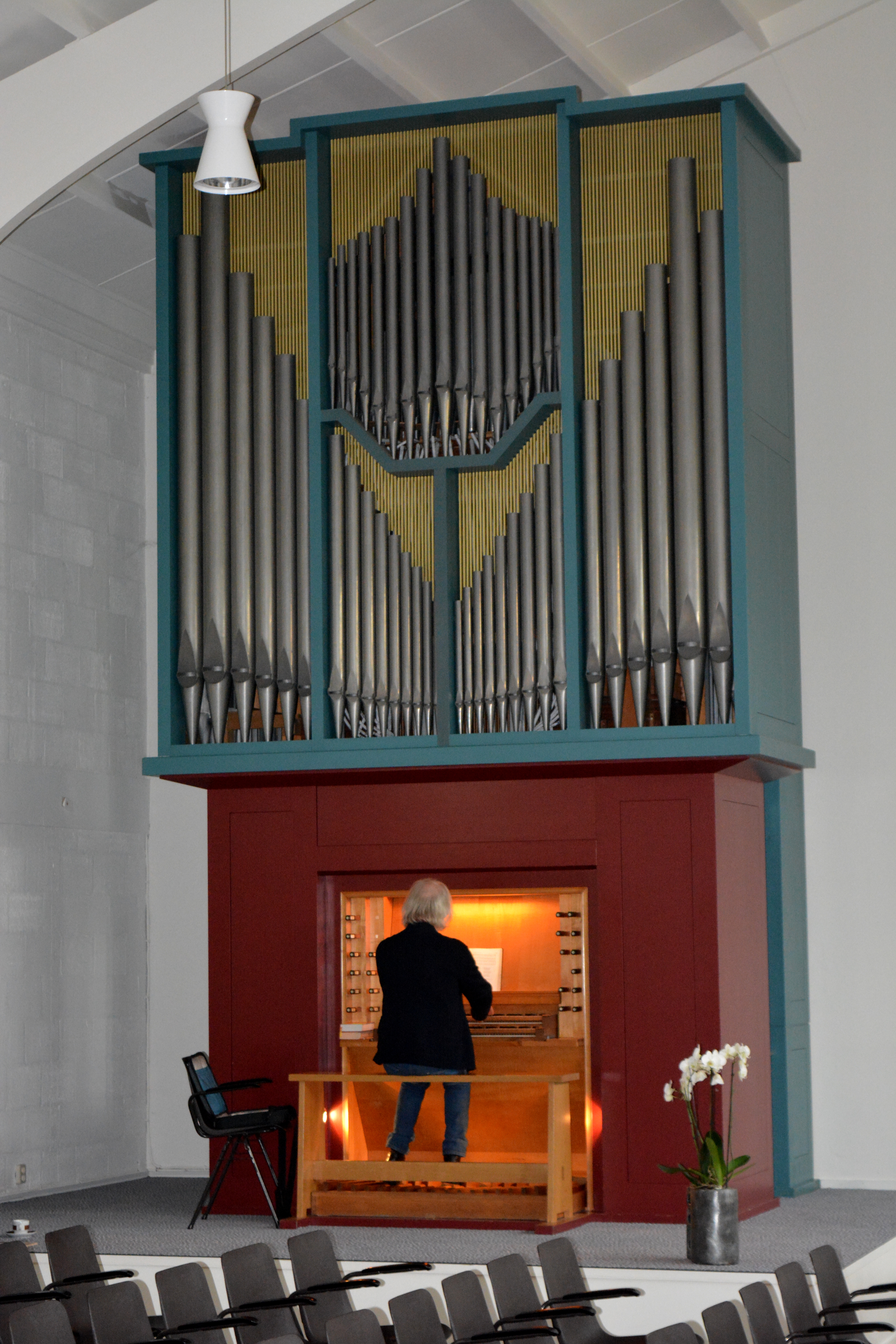 Hurdegaryp, protestanske tsjerke Nieuw Perspectief, oargel